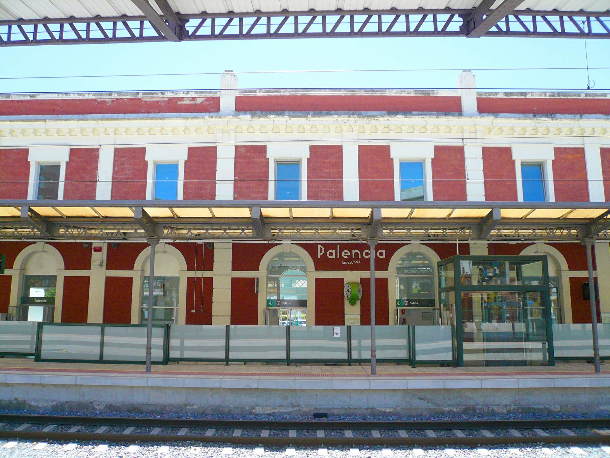 Estación de Adif de Palencia